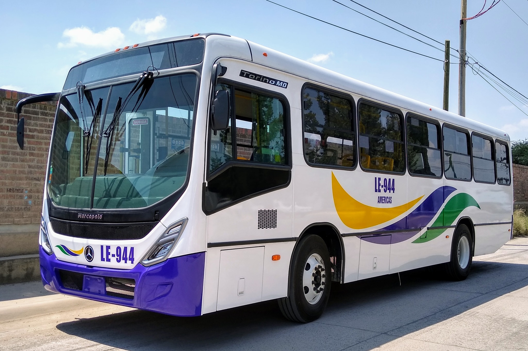 Unidad de la Línea Américas